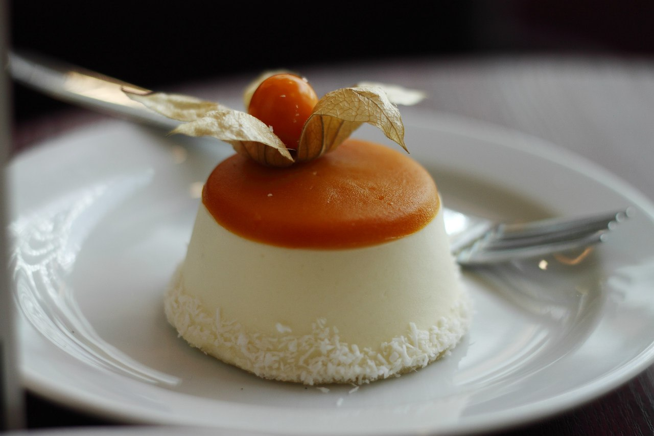 Манговый мусс на йогуртовой основе. Кафе в ТЦ "Галерея" на 3 этаже (Costa). Стоимость 185 рублей